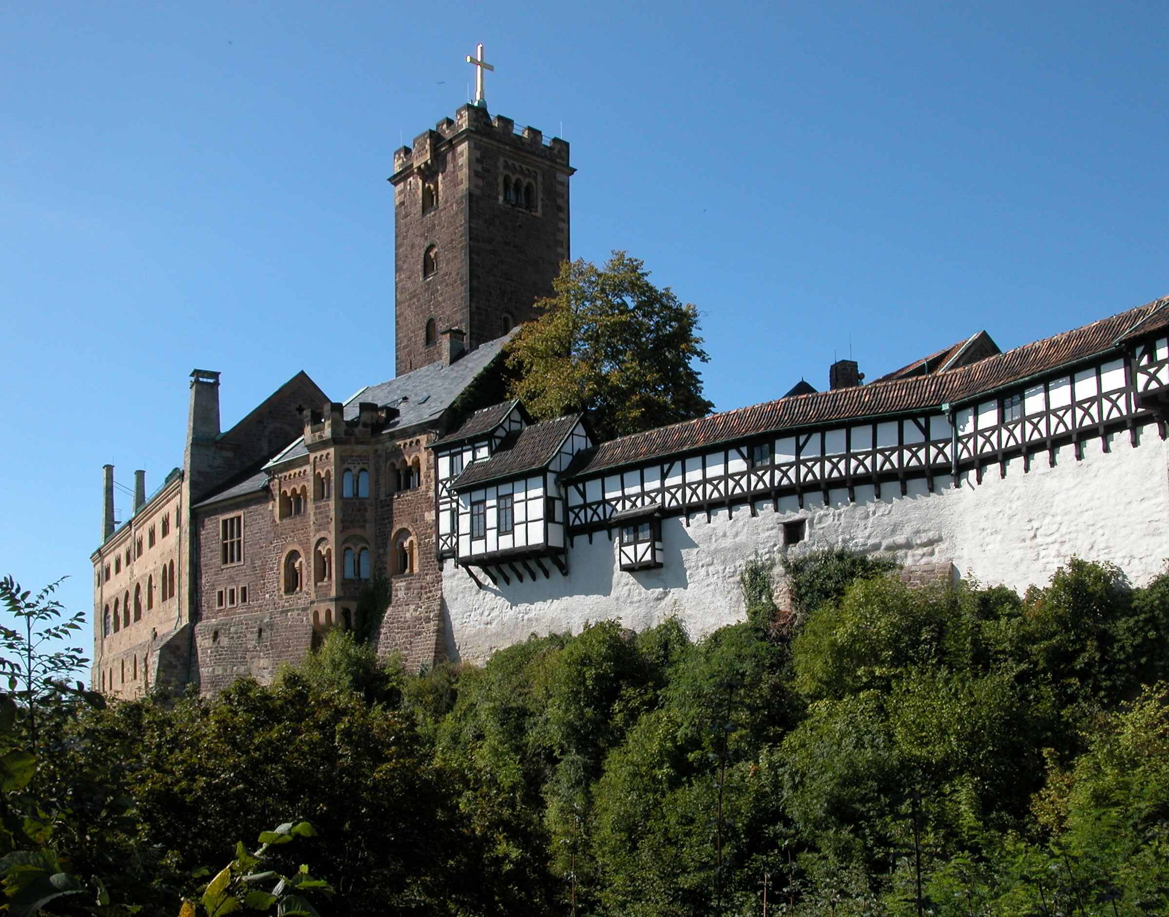 Wartburg, Eisenach, Germany.